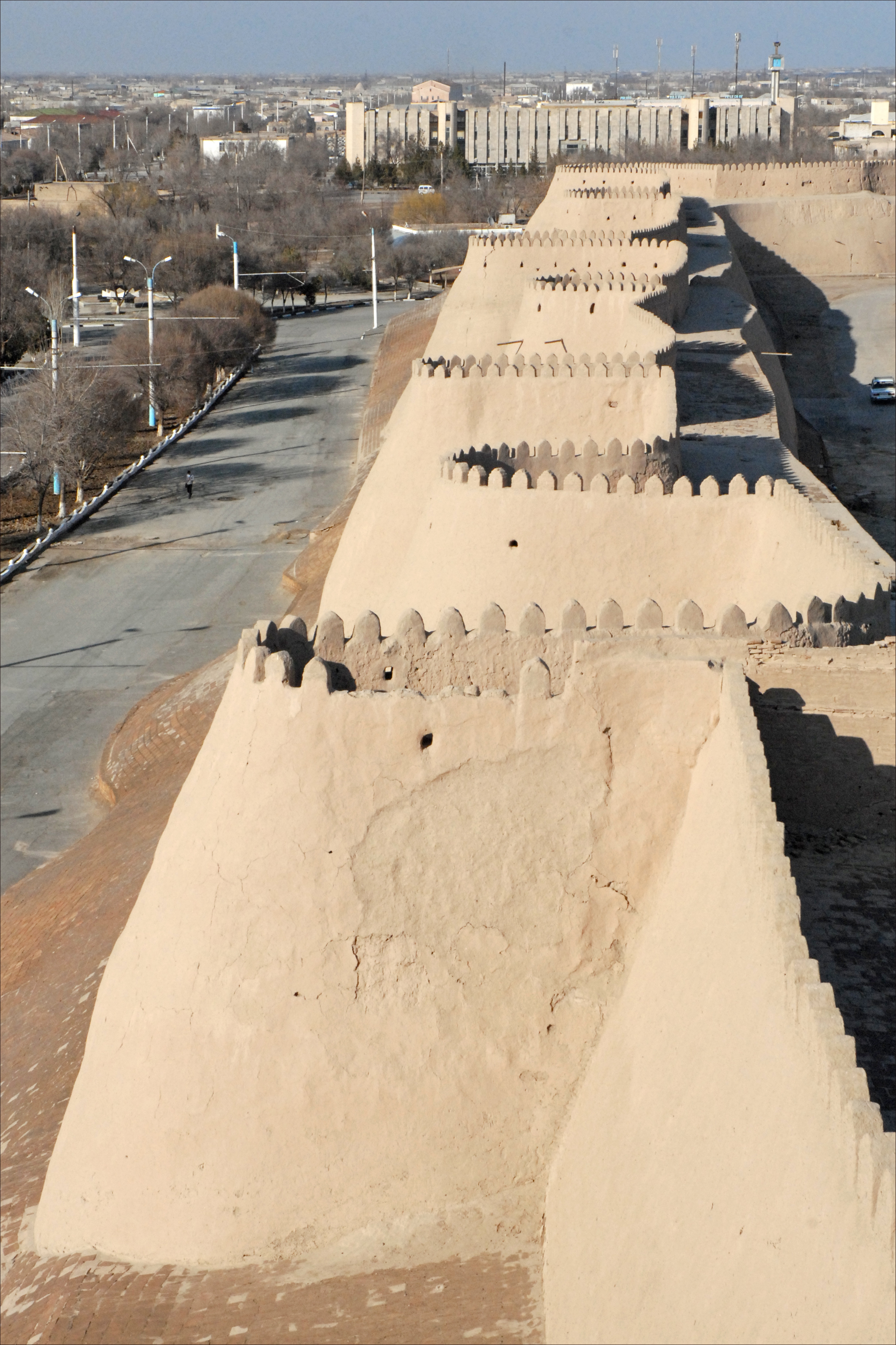 Restaurée à l'époque soviétique, la ville ancienne de Khiva (Ichan Kala) a été inscrite par l'UNESCO sur la liste du patrimoine mondial. C'est devenue une ville-musée mais près de 1500 familles y vivent aujourd'hui. Elle est située dans la région du Khorezm, très proche de la frontière avec le Turkménistan. Cette oasis sur la route de la soie est habitée depuis plus de 2.500 ans. Elle est entourée de murailles en terre séchée (pisé) et en briques et comprend de nombreux bâtiments religieux : mosquées et minarets, médersas, mausolées, palais..